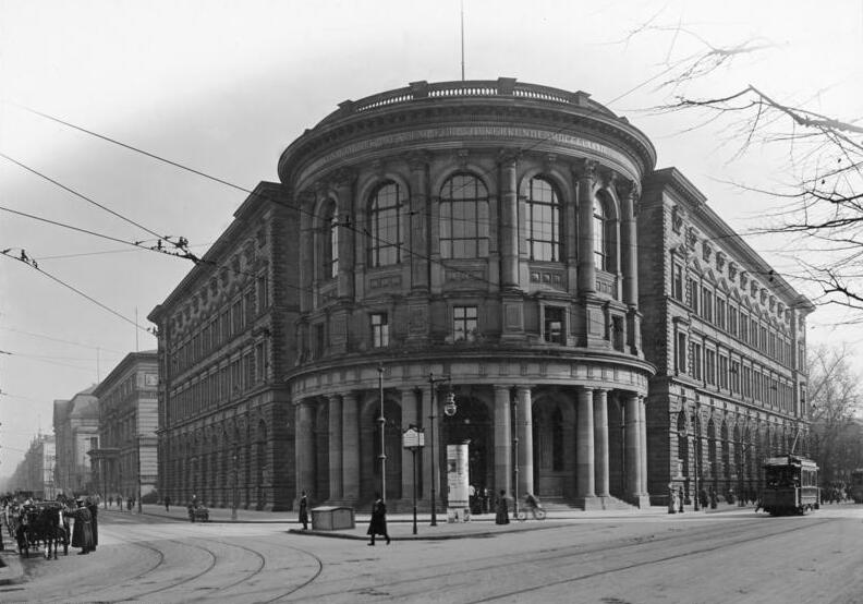 Berlin; Völkerkunde-Museum (Prinz-Albrechtstrasse)